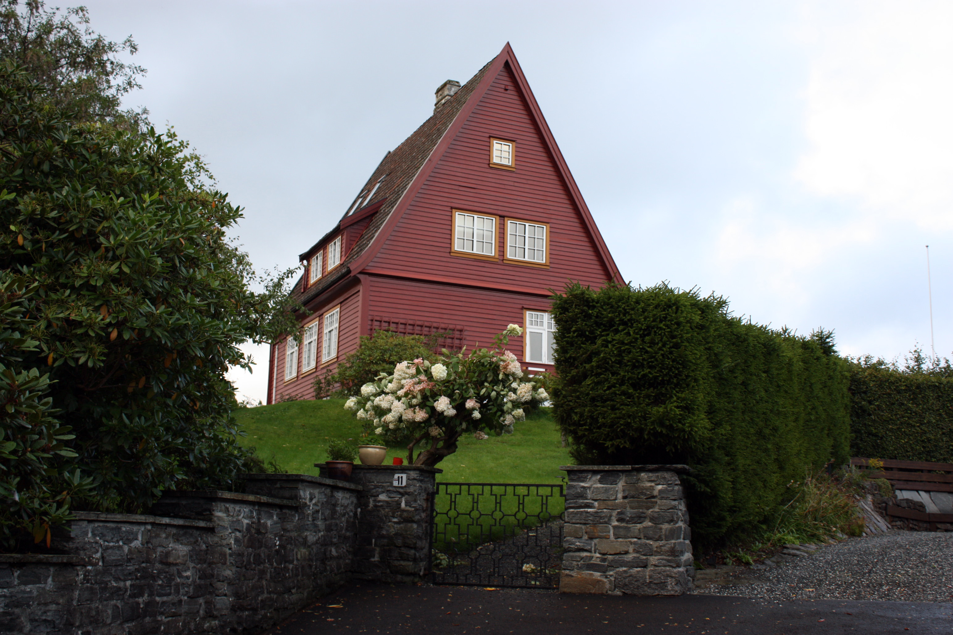 Nordahl Grieg's home, Fana, Bergen.